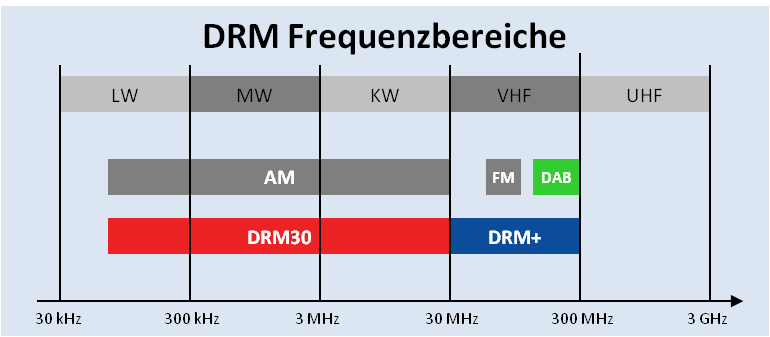 Digital Radio Mondiale - DRM-Frequenzbereiche